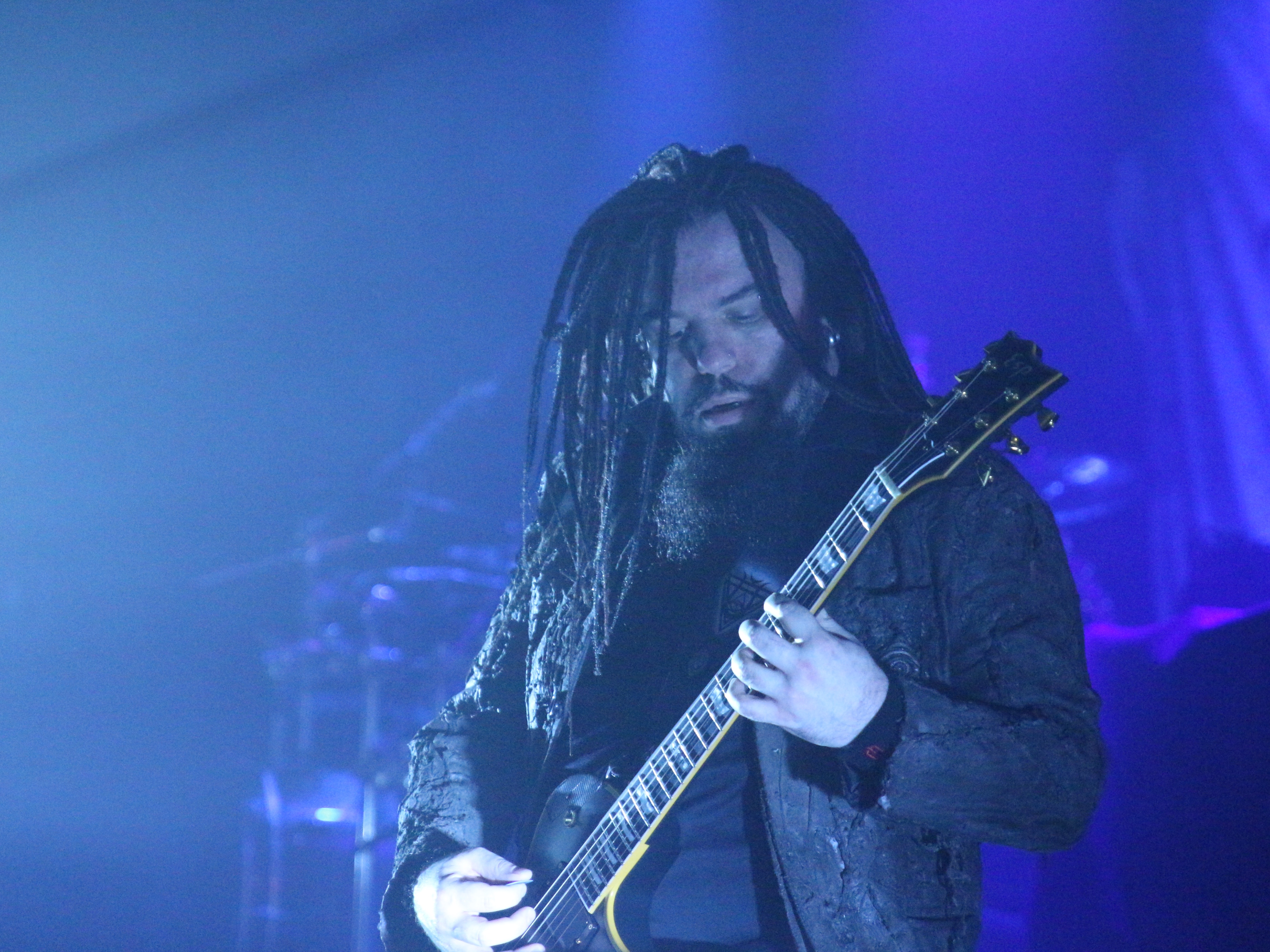 Septicflesh (black-métal symphonique, Grèce) en concert au Rocking Chair de Vevey avec Borgne et Moonspell, 21 mars 2015